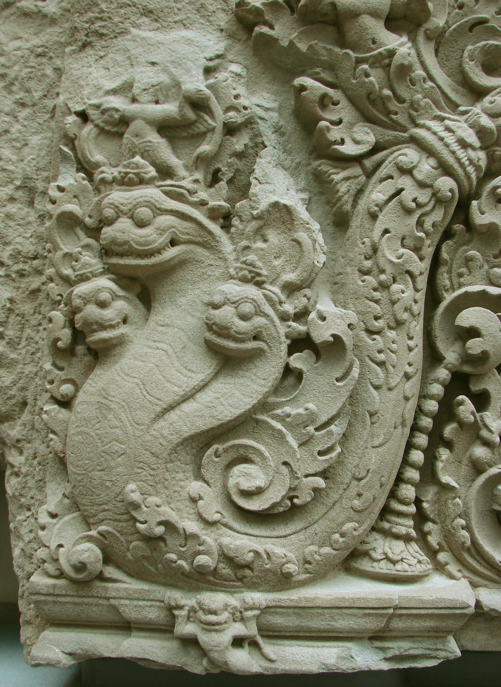 Linteau. Cambodge, Prasat Kok Po A (Angkor), province de Siemreap, style de Preah Ko, fin du 9ème siècle, grès.Détail: naga maîtrisé par Garuda.